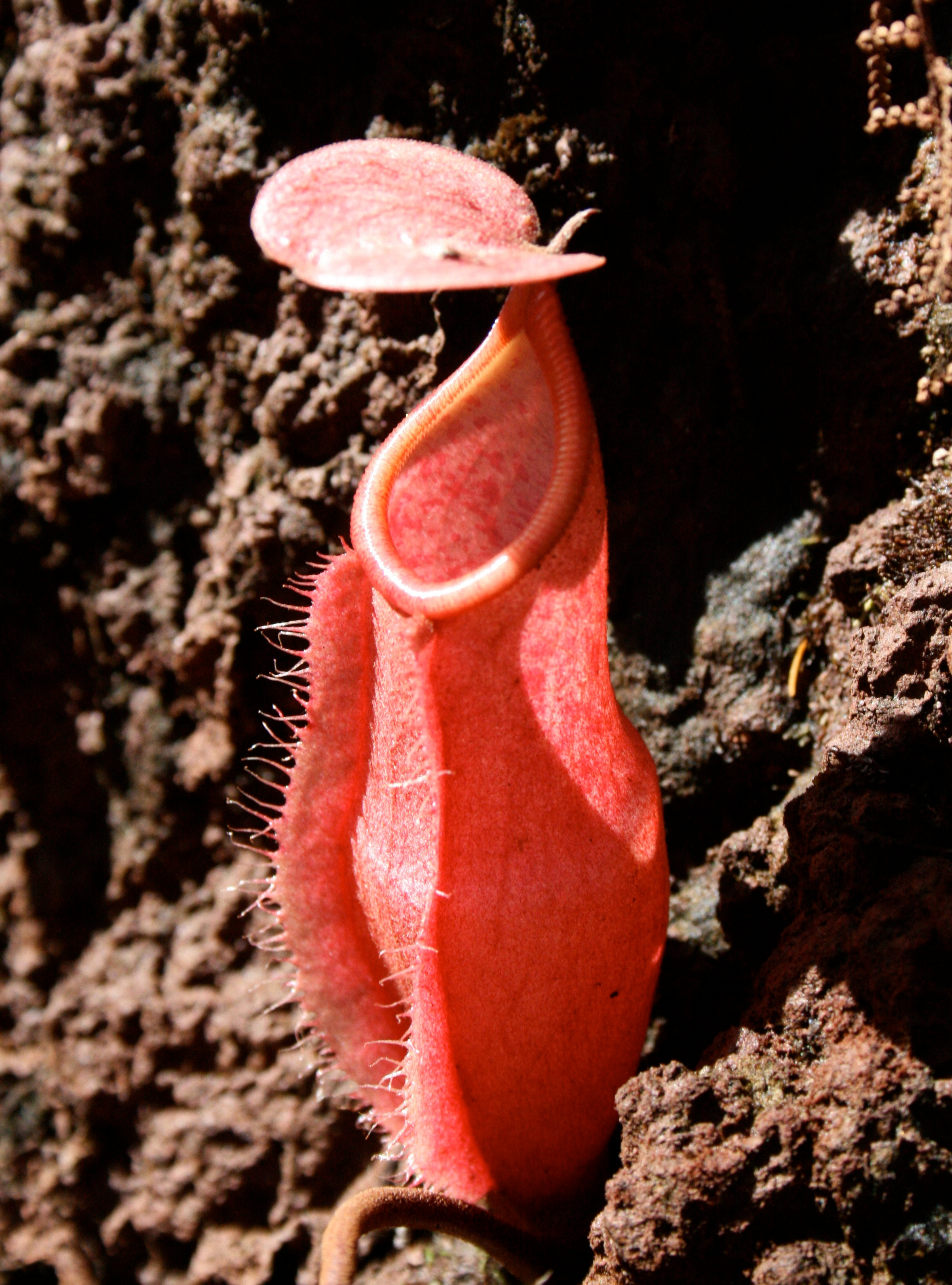 Nepenthes vieillardii lower pitcher. Original description: "Cette plante carnivore de la famile des Nepenthes est très présente le long des chemins de la Rivière Bleu. La fleur n'est pas suspendu contrairement à ce que le pourrait croire." Image has been used on Micronesian postage stamp.